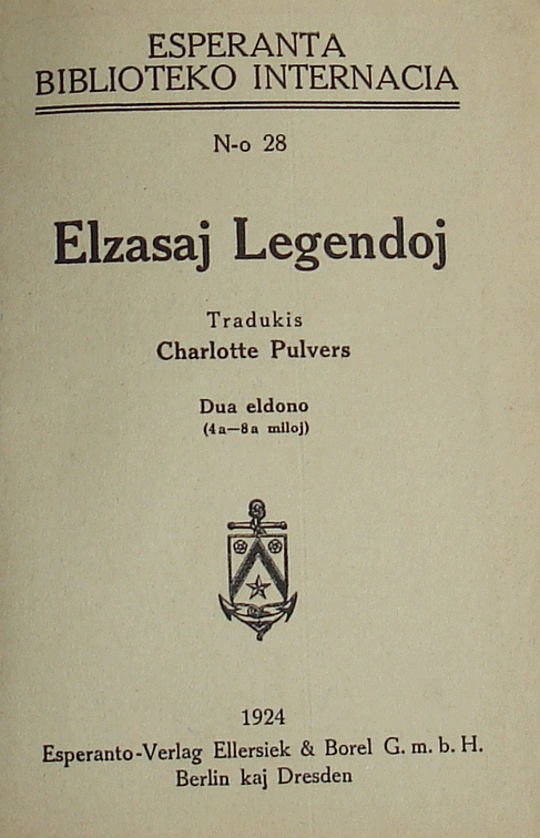 Elzasaj Legendoj